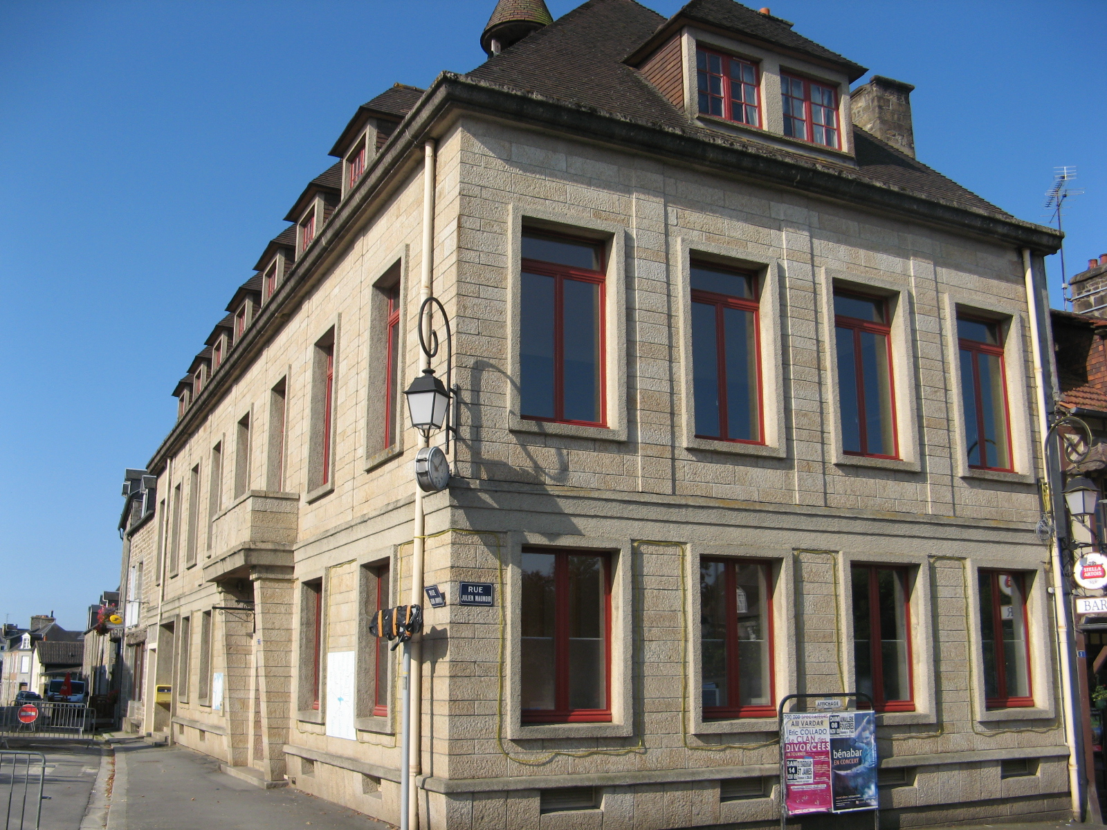 Mairie de Saint Georges de Reintembault